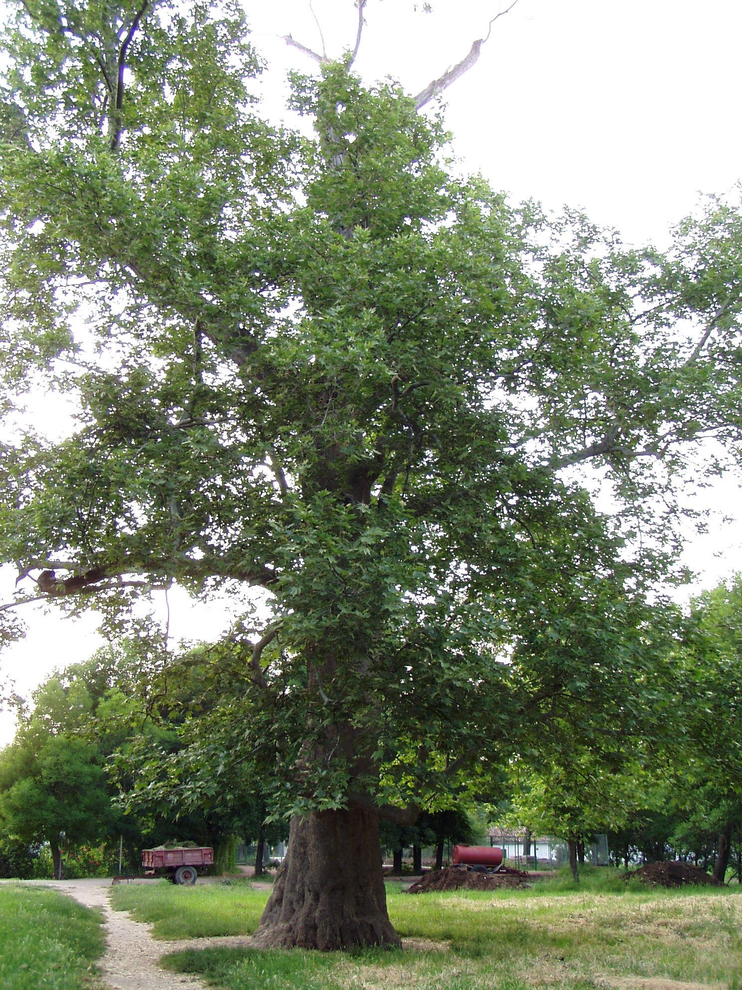 Парк «Салгирка». Старый клёнолистный платан.